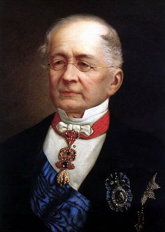 Александр Михайлович Горчаков (1798—1883). Министр иностранных дел Российской Империи, канцлер.